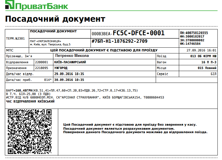 Електронний квиток на потяг № 13 сполученням Київ - Ужгород